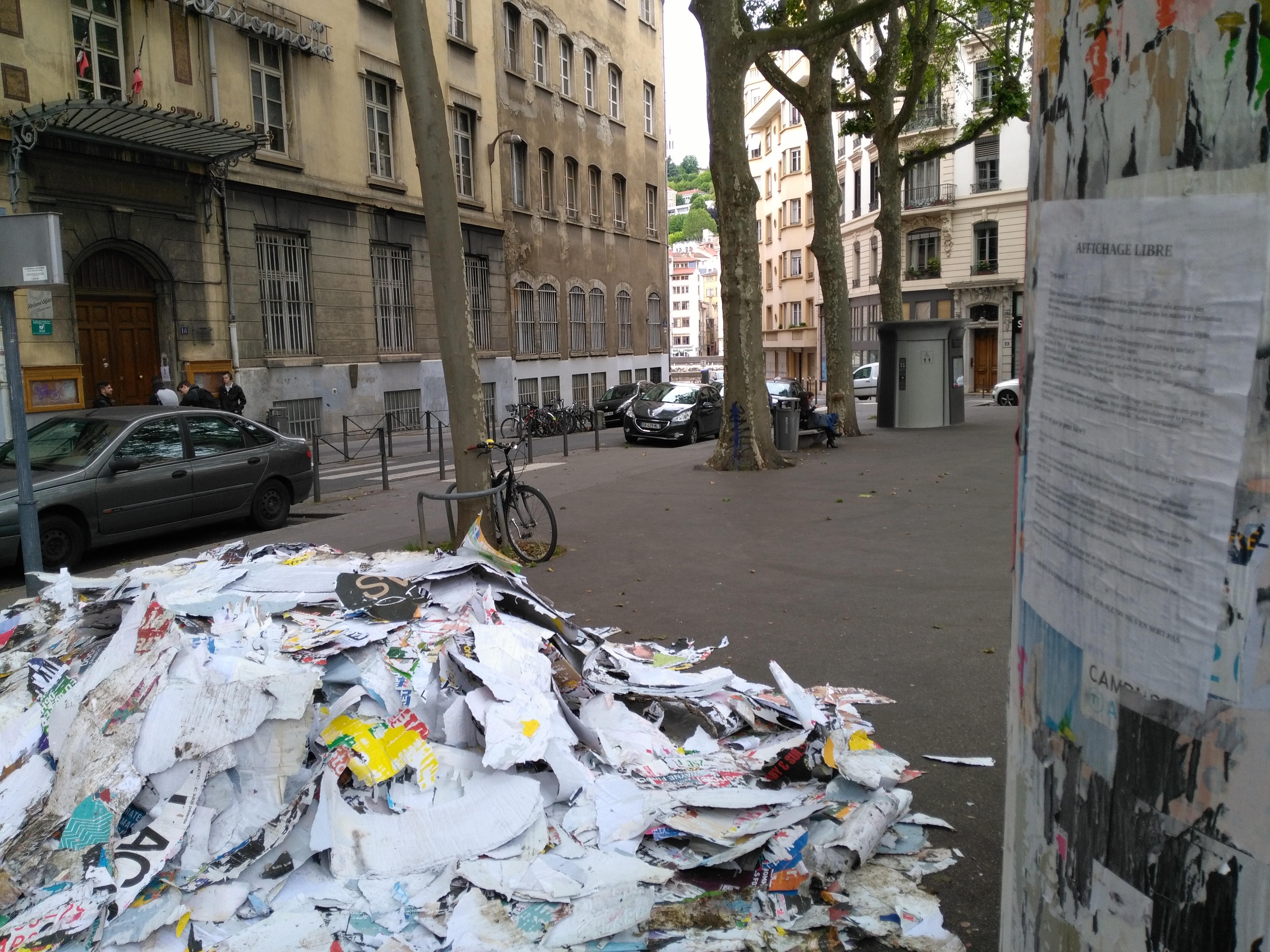 Le tas d’affiches arrachées représente environ deux mois de communication publicitaire, arrachées par six personnes afin de démontrer le gâchis de papier et de colle engendré par la publicité.